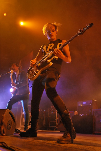 Mikey Way presentándose junto a My Chemical Romance en Montreal, Canadá, durante la gira Honda Civic Tour, el 16 de agosto de 2011.